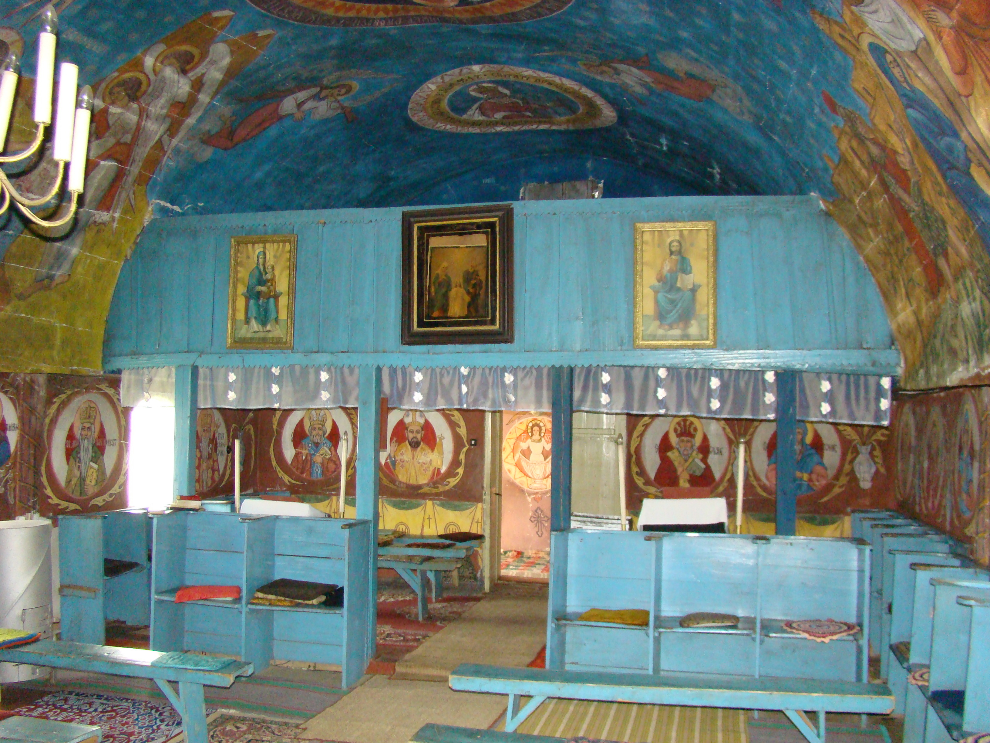 Biserica de lemn, sat aparţinător SFÂNTU GHEORGHE; oraş IERNUT